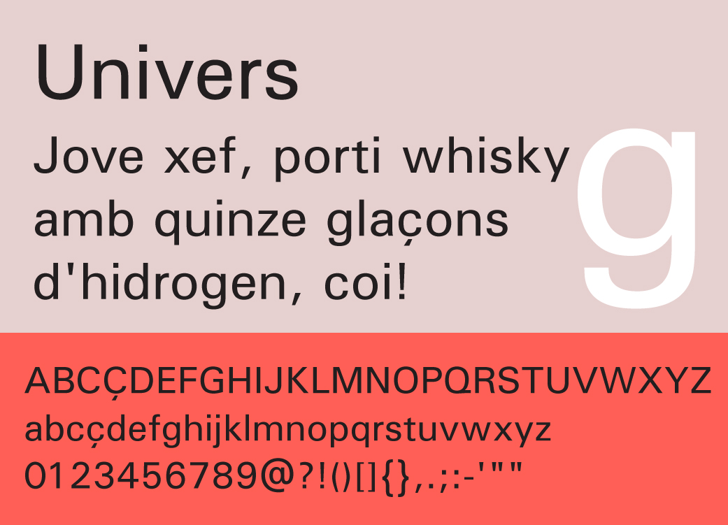 Univers mostra lletra tipogràfica